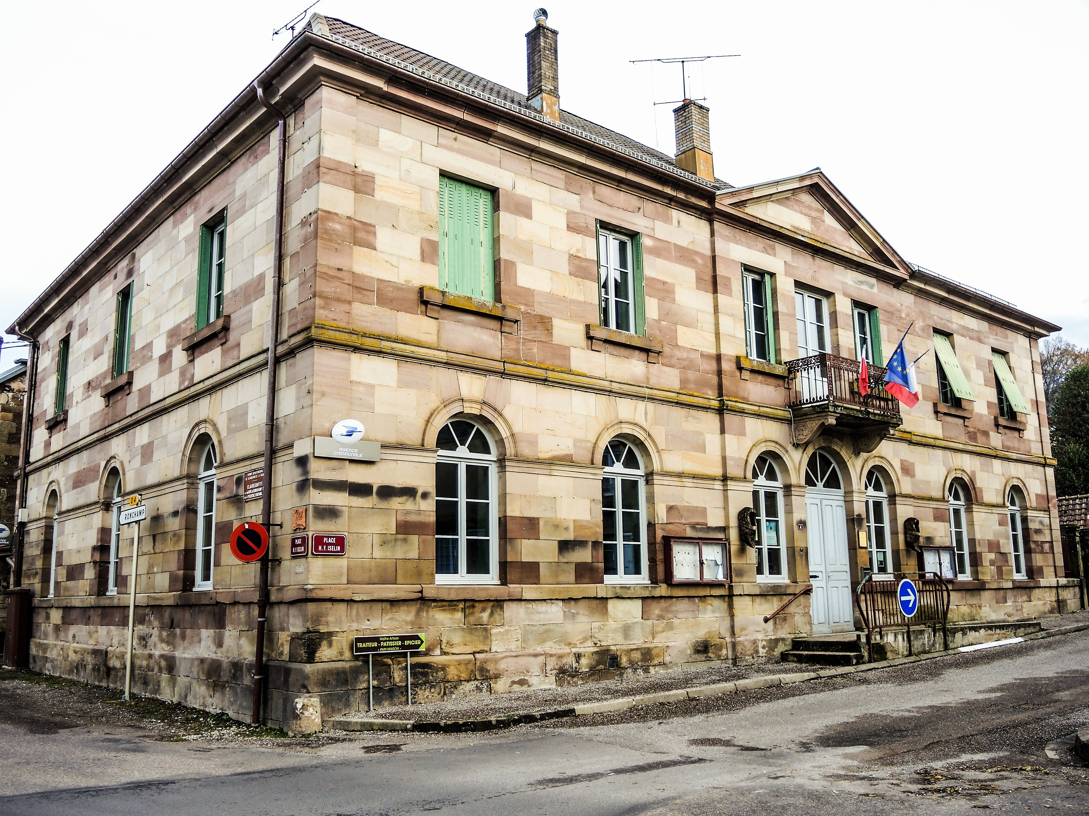 Mairie de Clairegoutte. Haute-Saône.